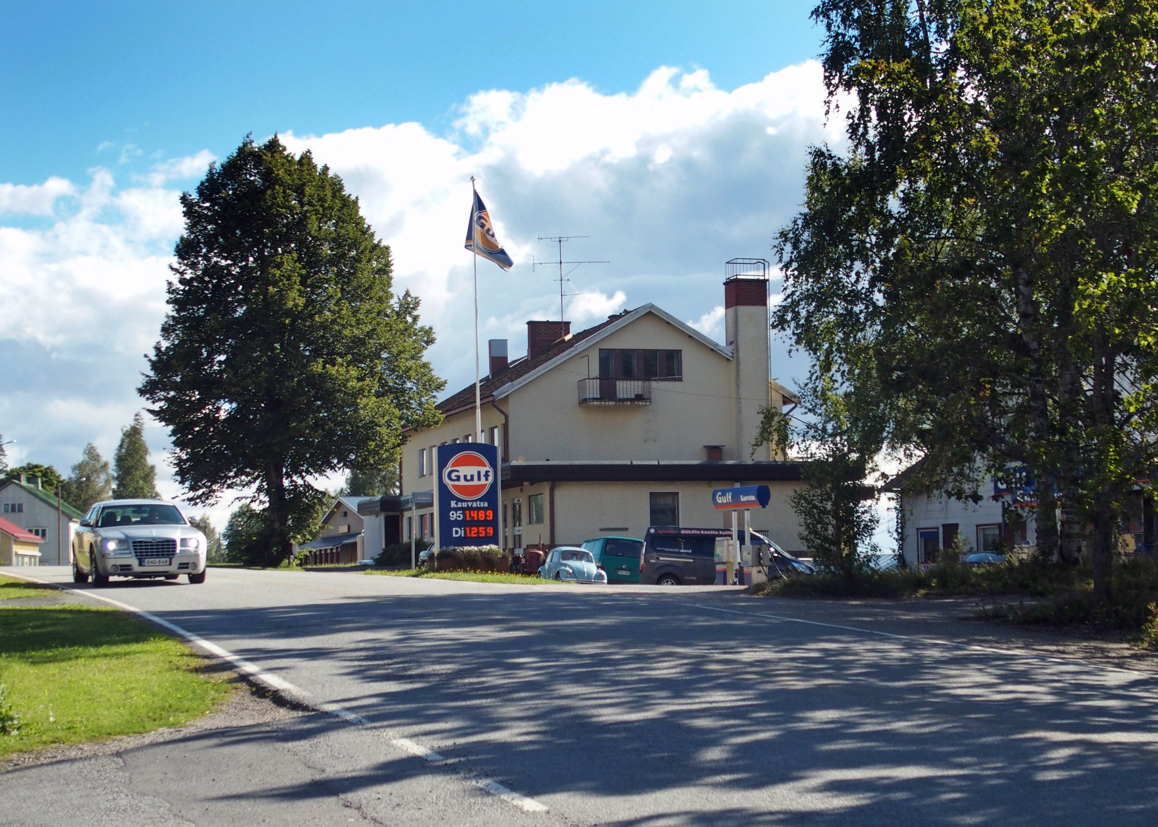 "Museoitu" Gulf-huoltamo Kauvatsan keskustassa.